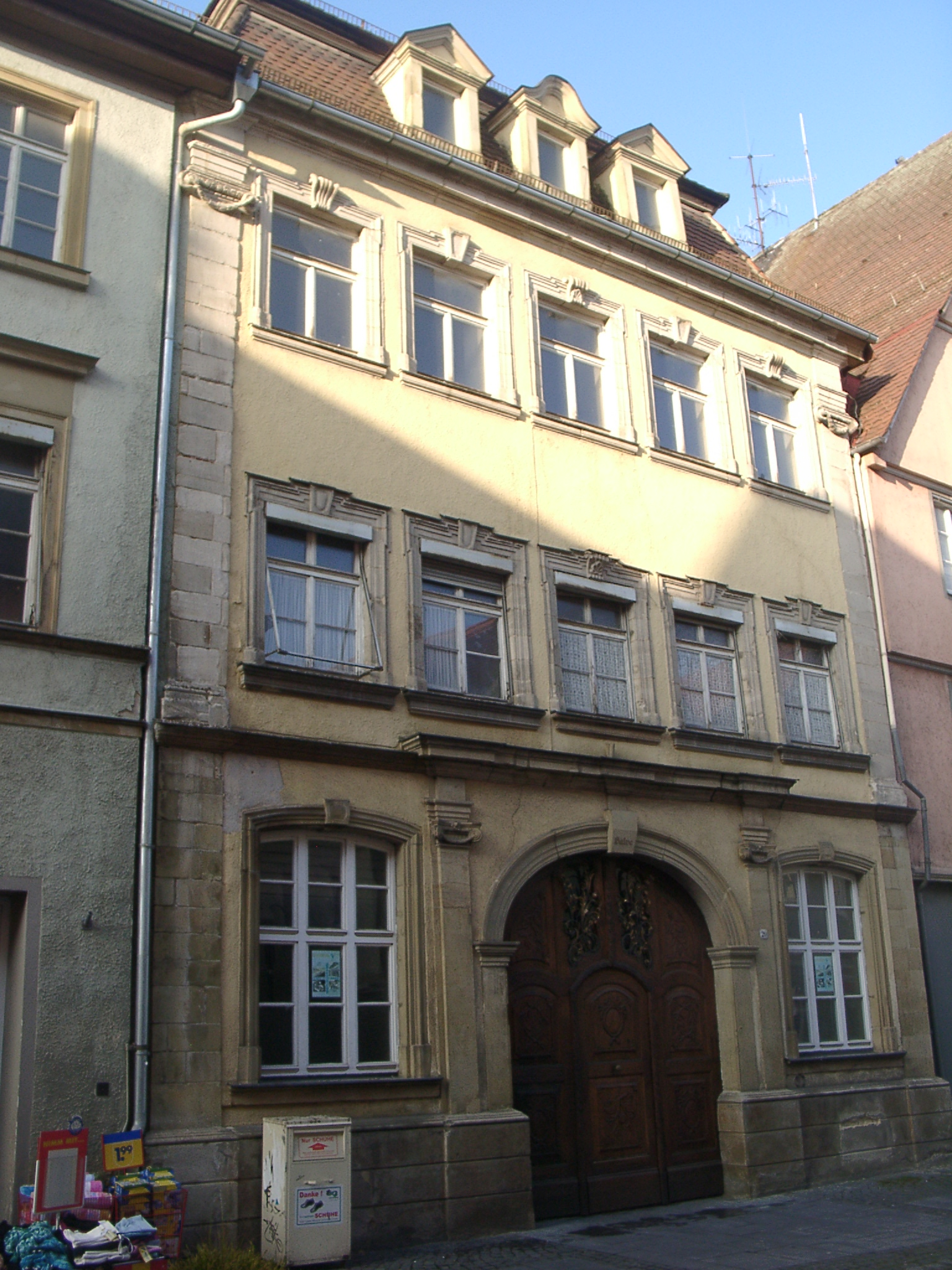 Schwäbisch Gmünd, ehem. Mutterhaus Bocksgasse